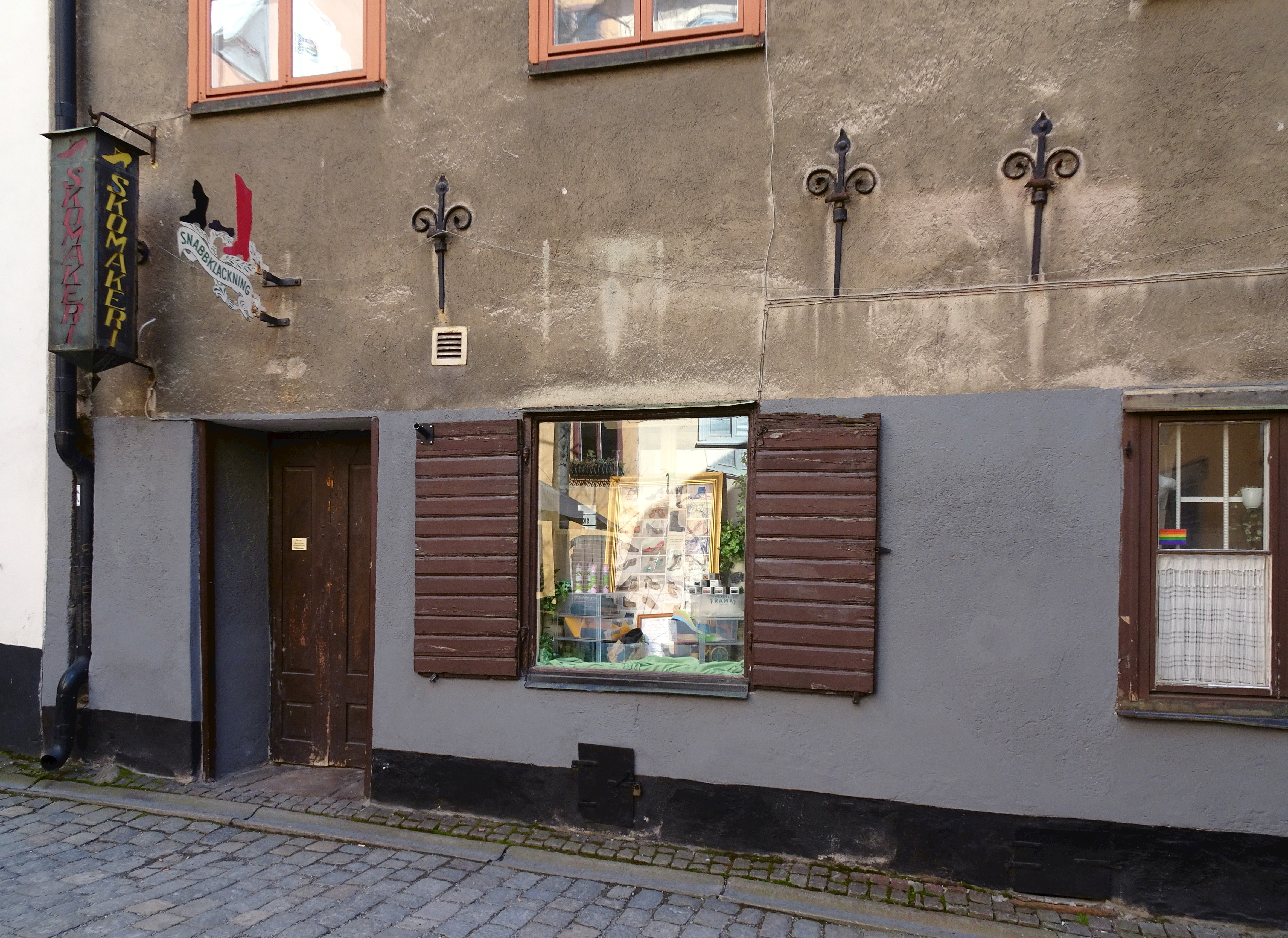 Överskärargränd sedd från Gåstorget